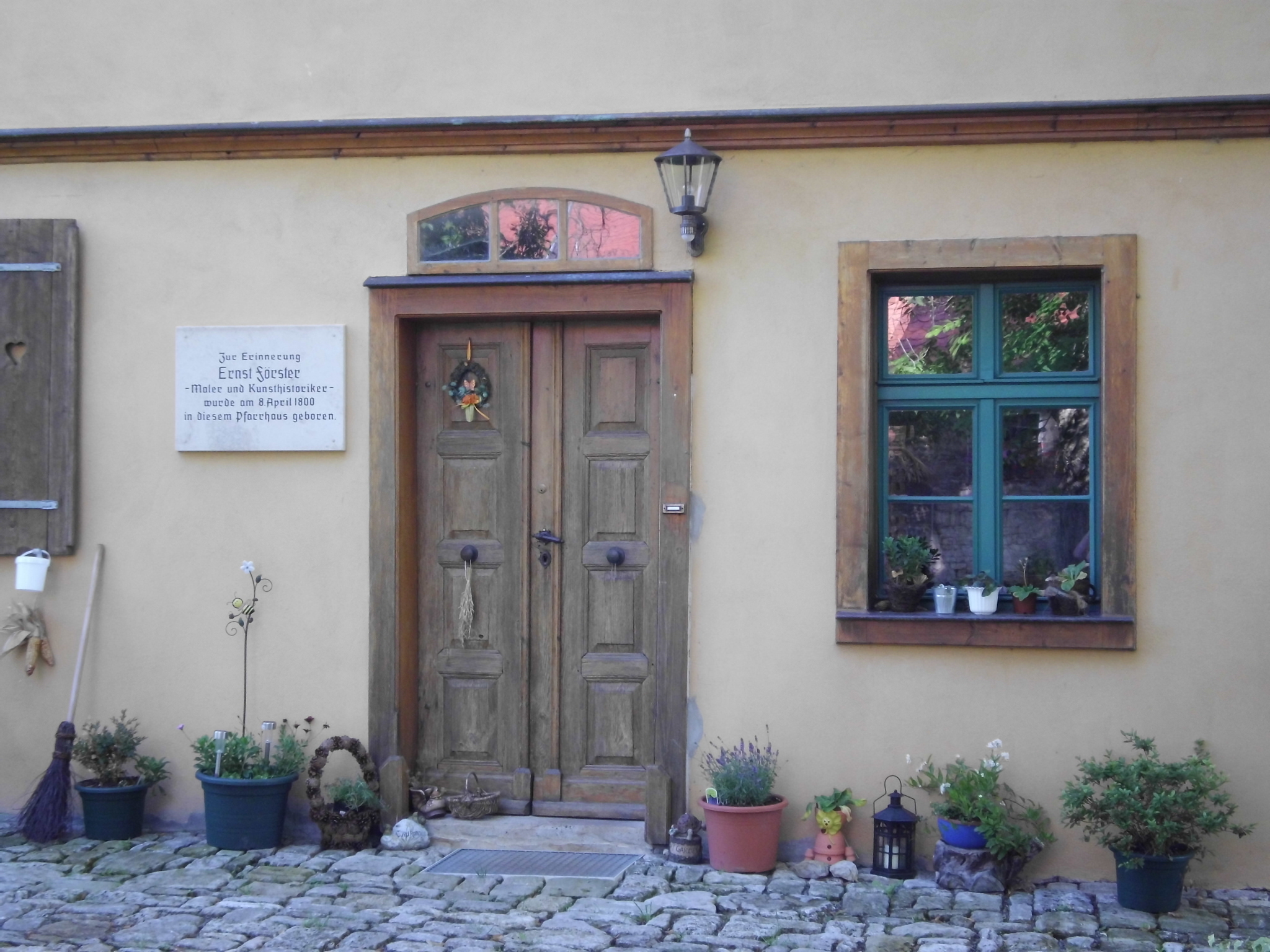 Förstergedenkstätte